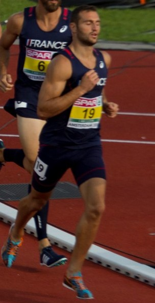 0746 1500m tienkamp